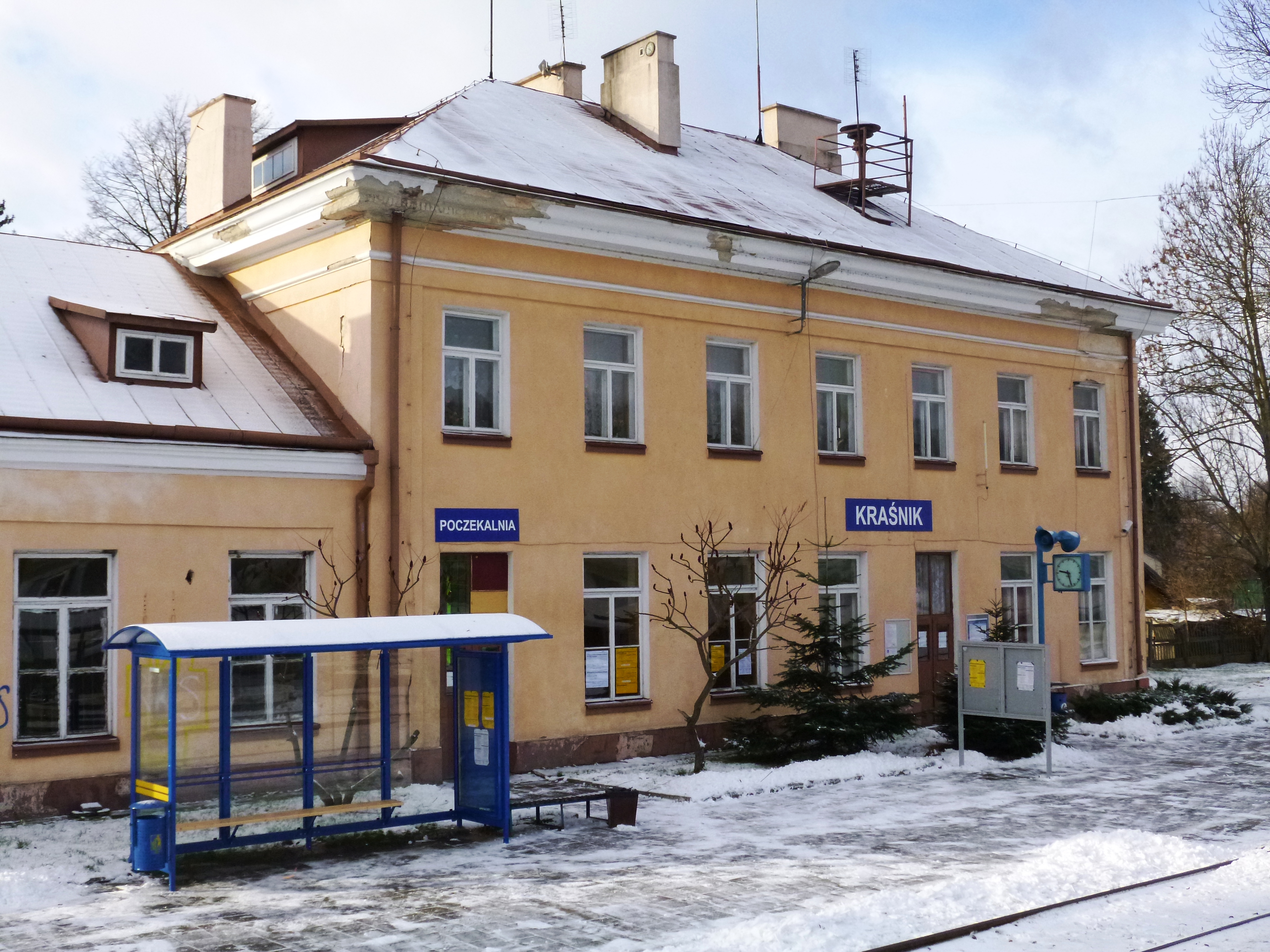 Kraśnik, 2013-12-06